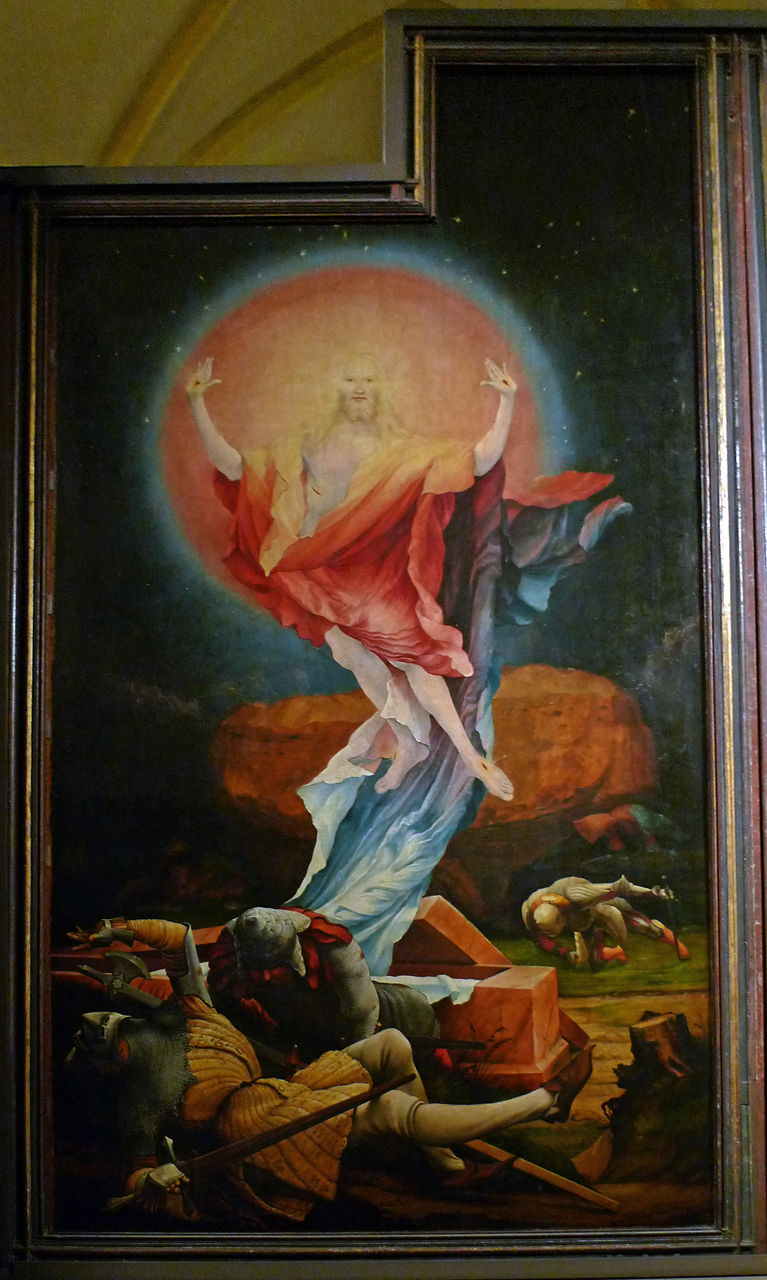 Himmelfahrt Christi Isenheimer Altar, zweite Schauseite